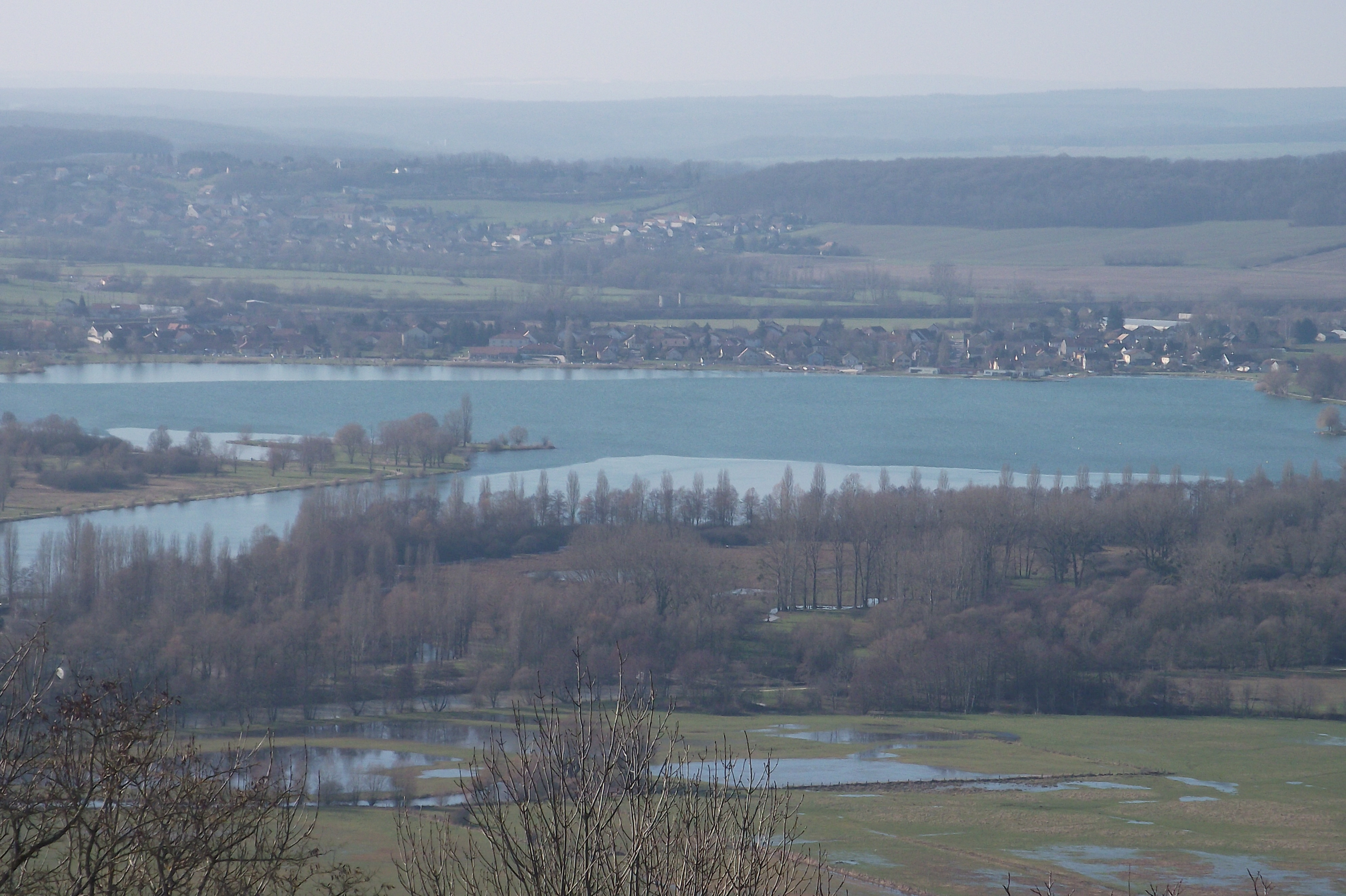 Le Lac de Vaivre